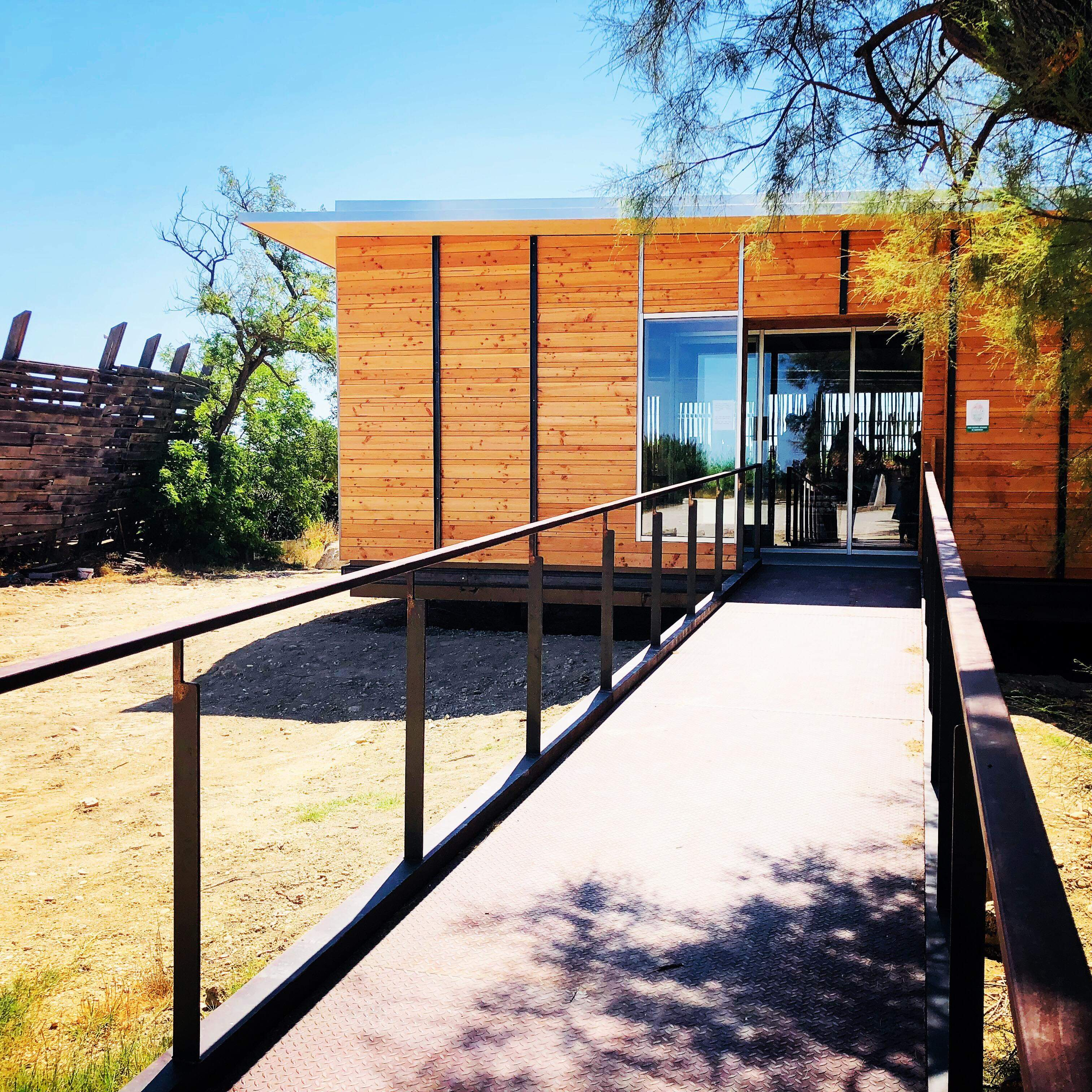 Passerelle pour accéder à l'accueil du Musée de la Camargue